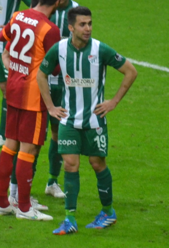 Emre Taşdemir (2015)